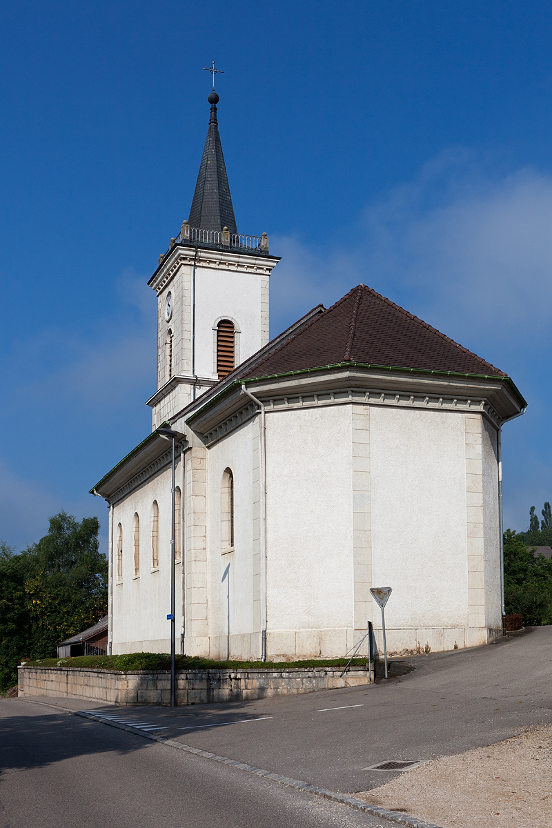 L'église Saint-Germain et Protais à Réclère (Haute-Ajoie, JU)